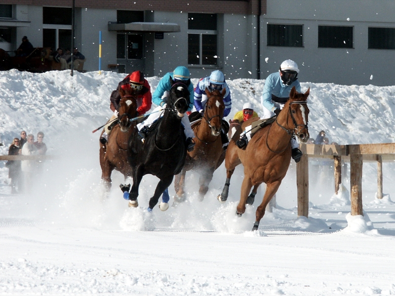 Horse (Equus ferus caballus)